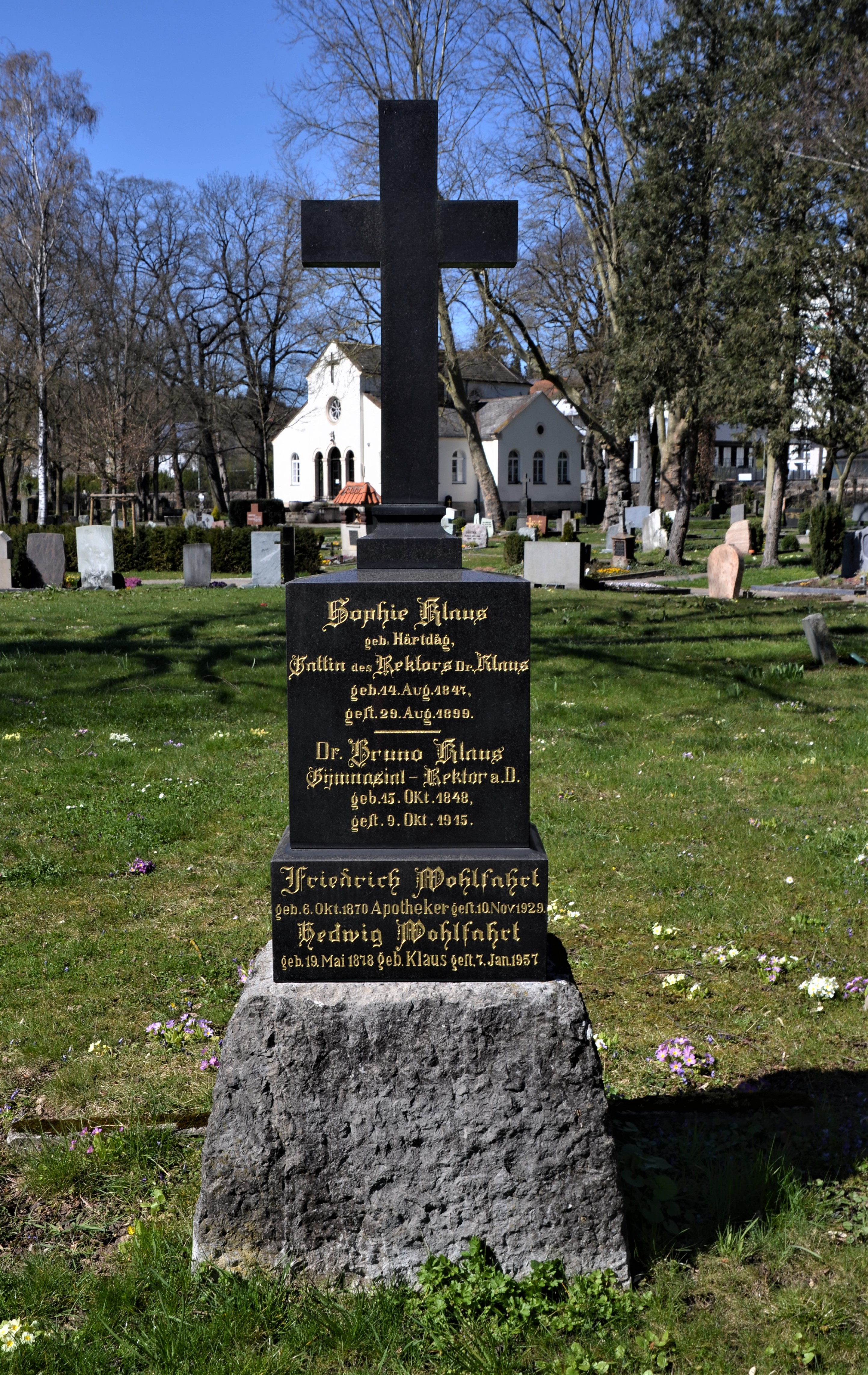 Familienraum Klaus, St. Leonhard Schwäbisch Gmünd